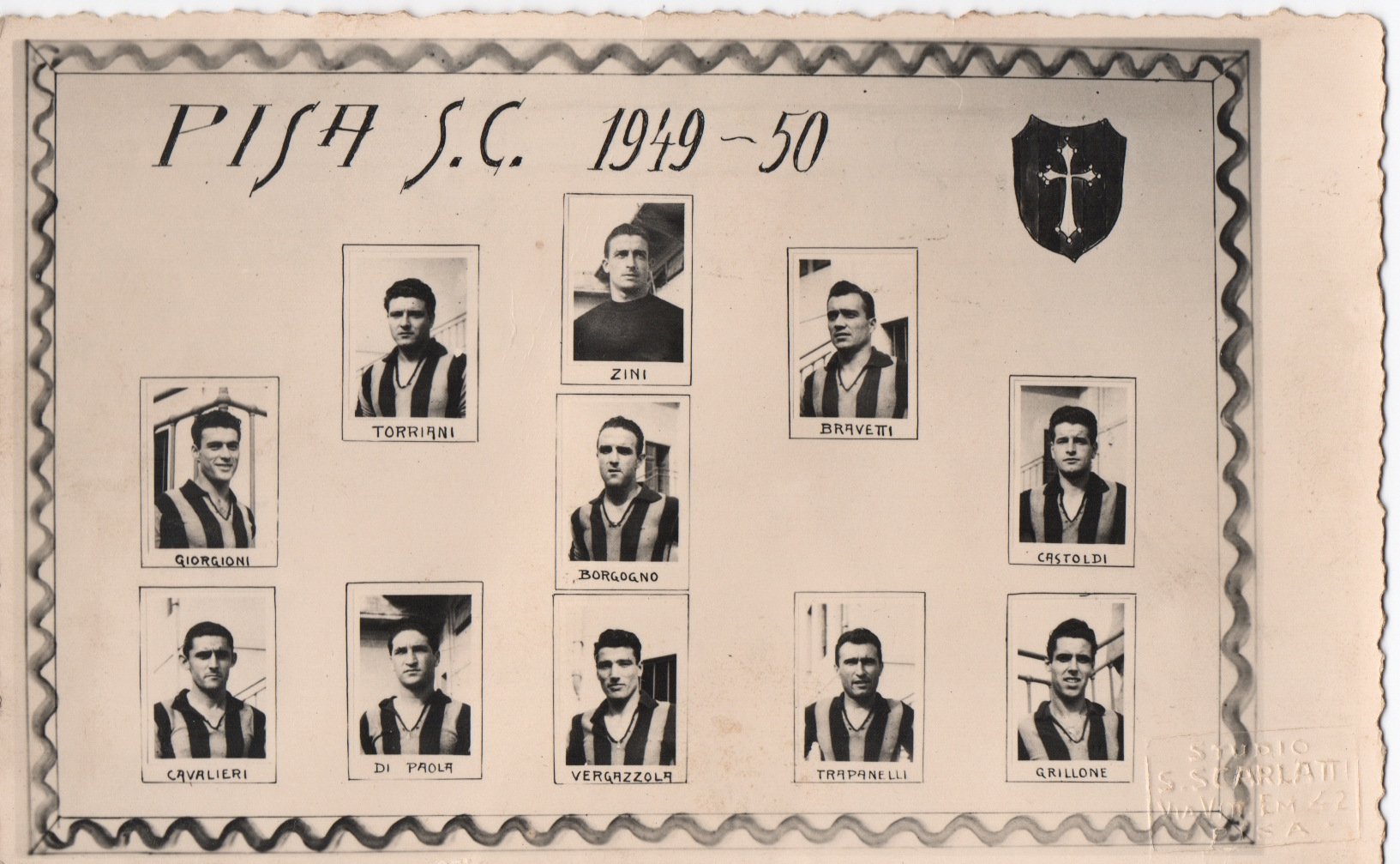 Cartolina con la formazione titolare del Pisa nella stagione 1949-50.